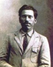 Baba Bujha Singh, 1930